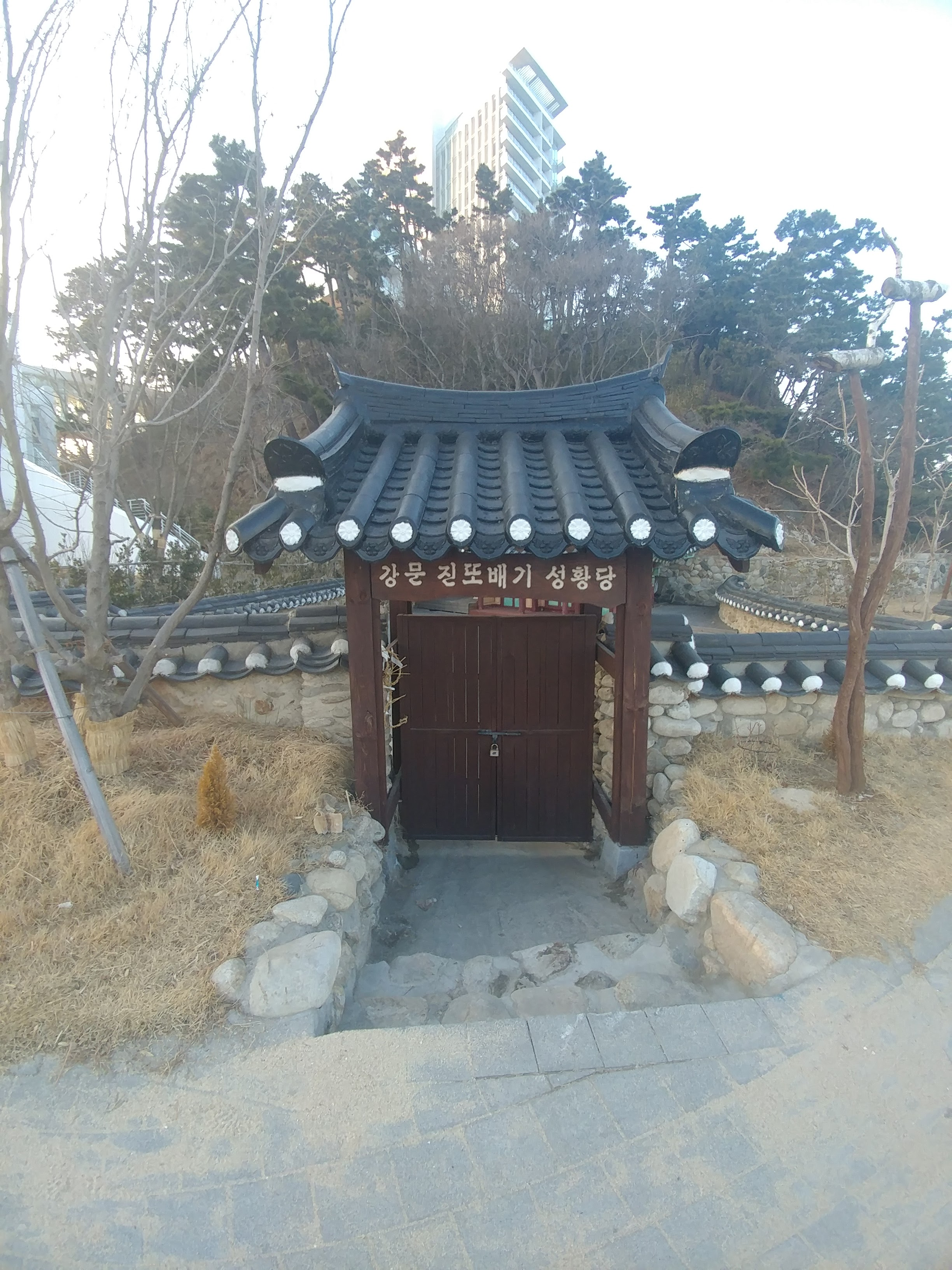 강문 진또배기 성황당